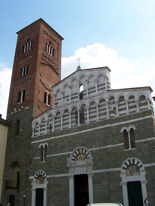 Lucca - Chiesa di S. Pietro Somaldi